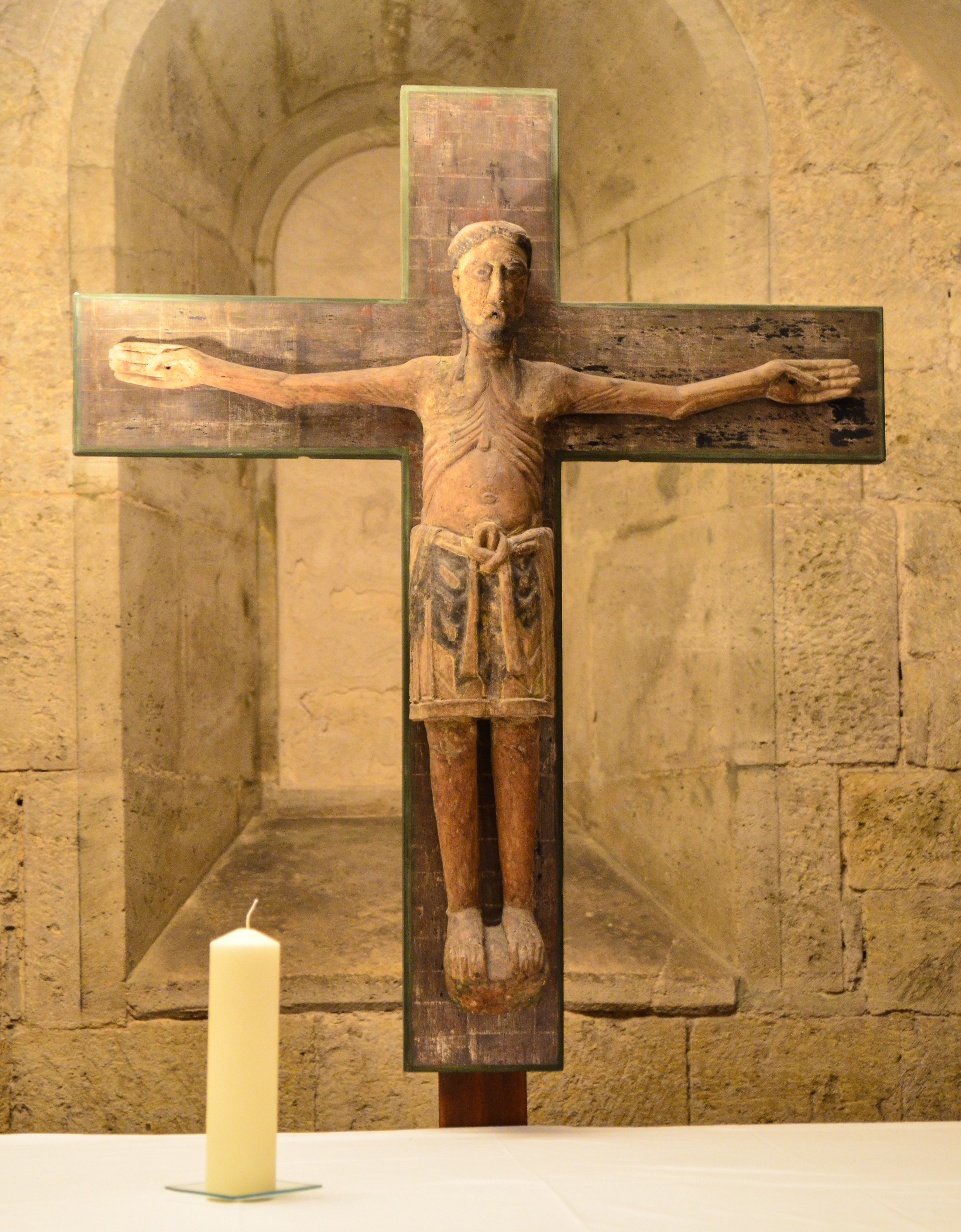 Kruzifix in der Krypta des Doms zu Naumburg